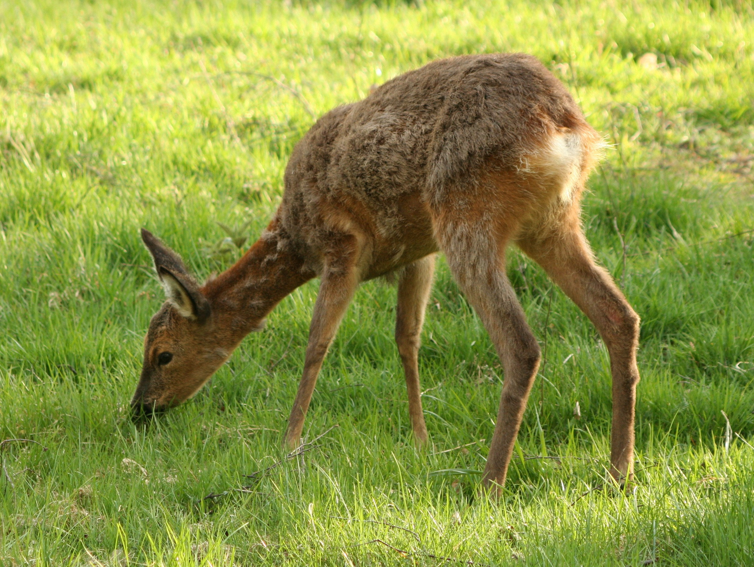 Capreolus_capreolus